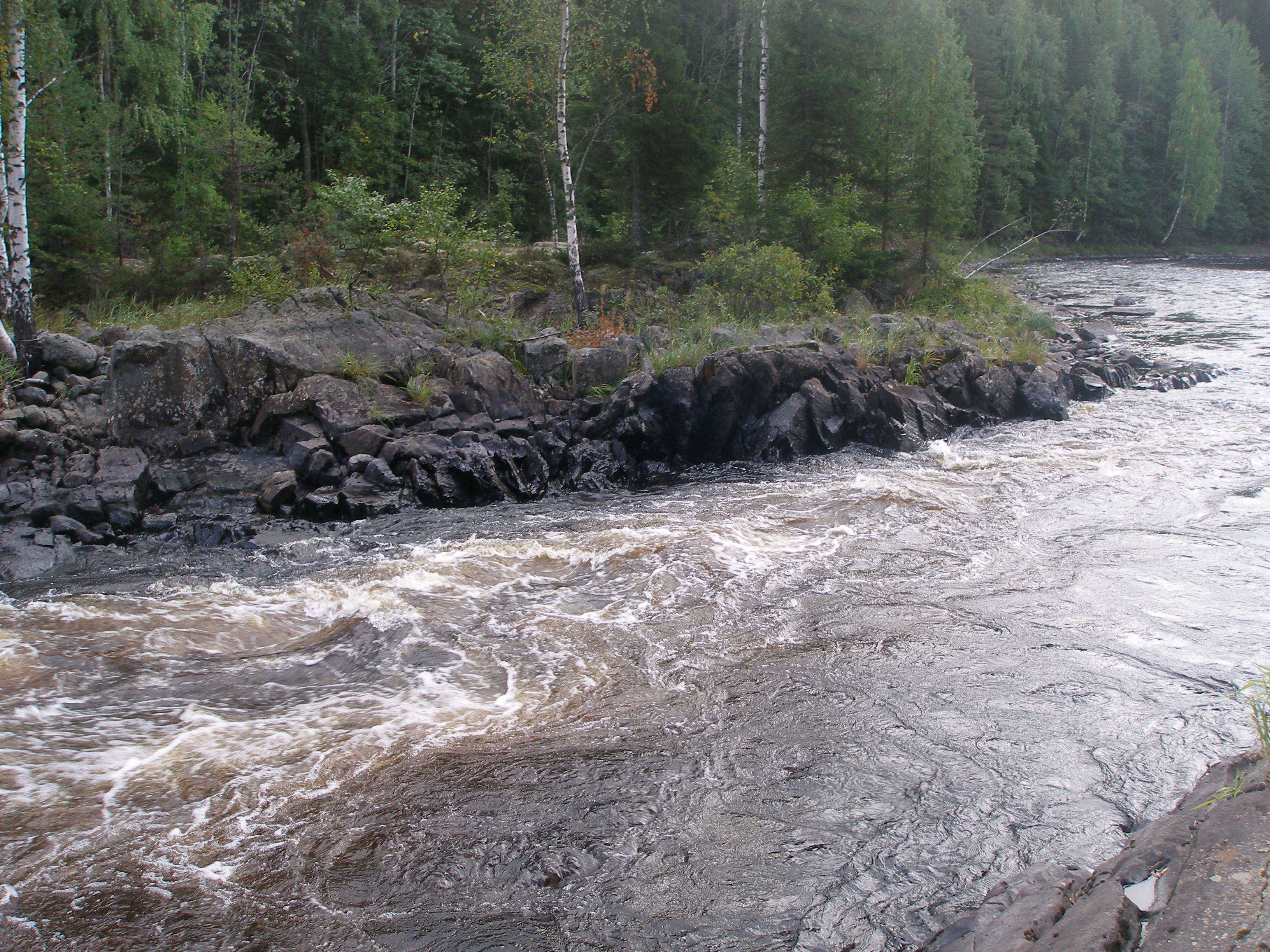 Янисйоки